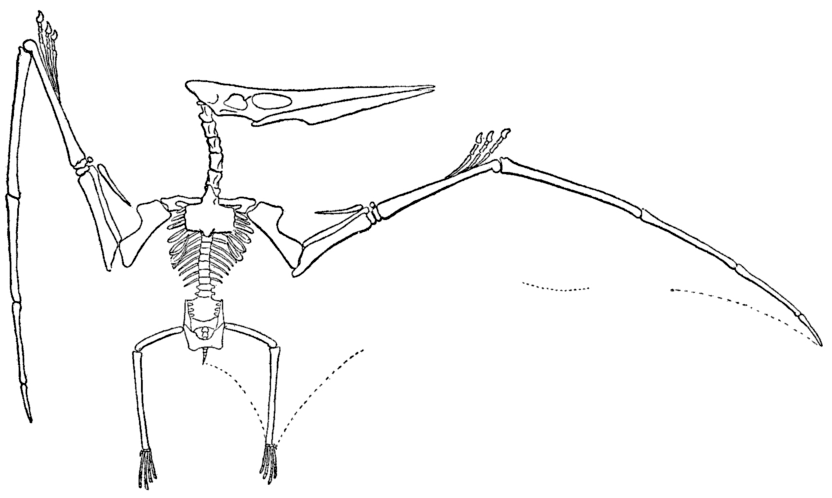 Pteranodon ("Ornithostoma ingens") skeletal diagram.